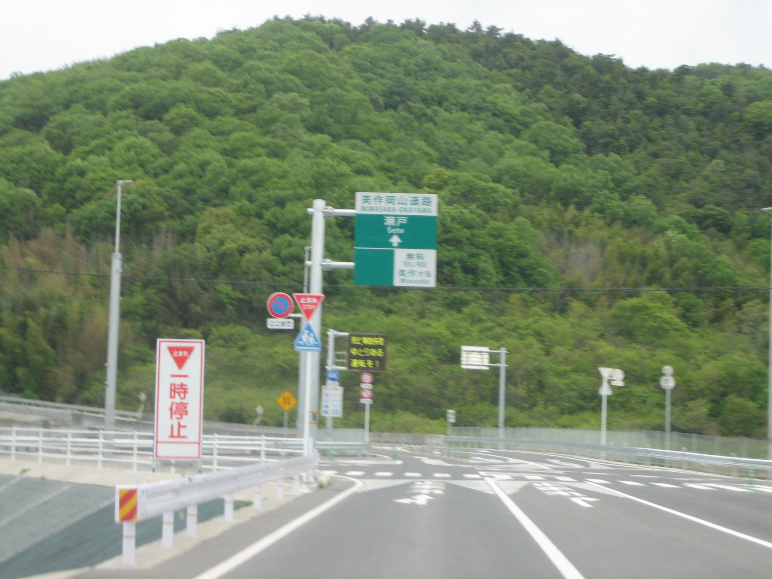 瀬戸IC入口